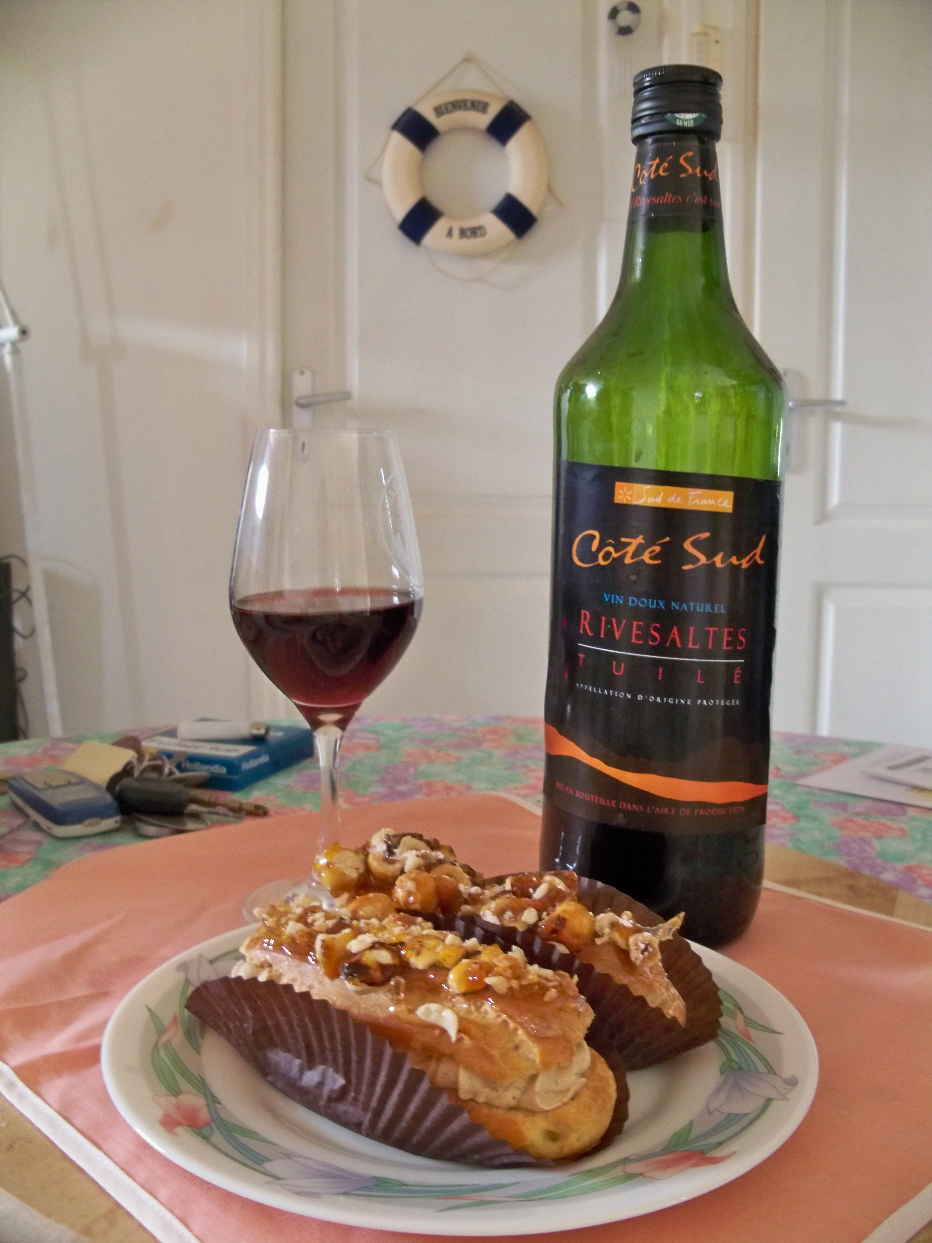 bouteille de Rivesaltes Tuilé